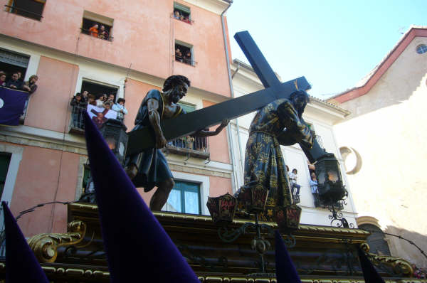 Nuestro Padre Jesús Nazareno del Salvador en la procesión Camino del Calvario de Cuenca